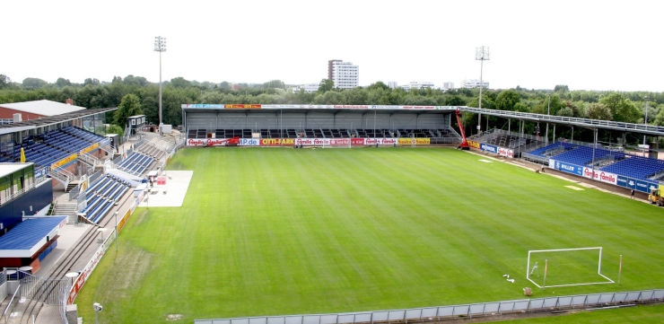 Holsteinstadion beim Umbau